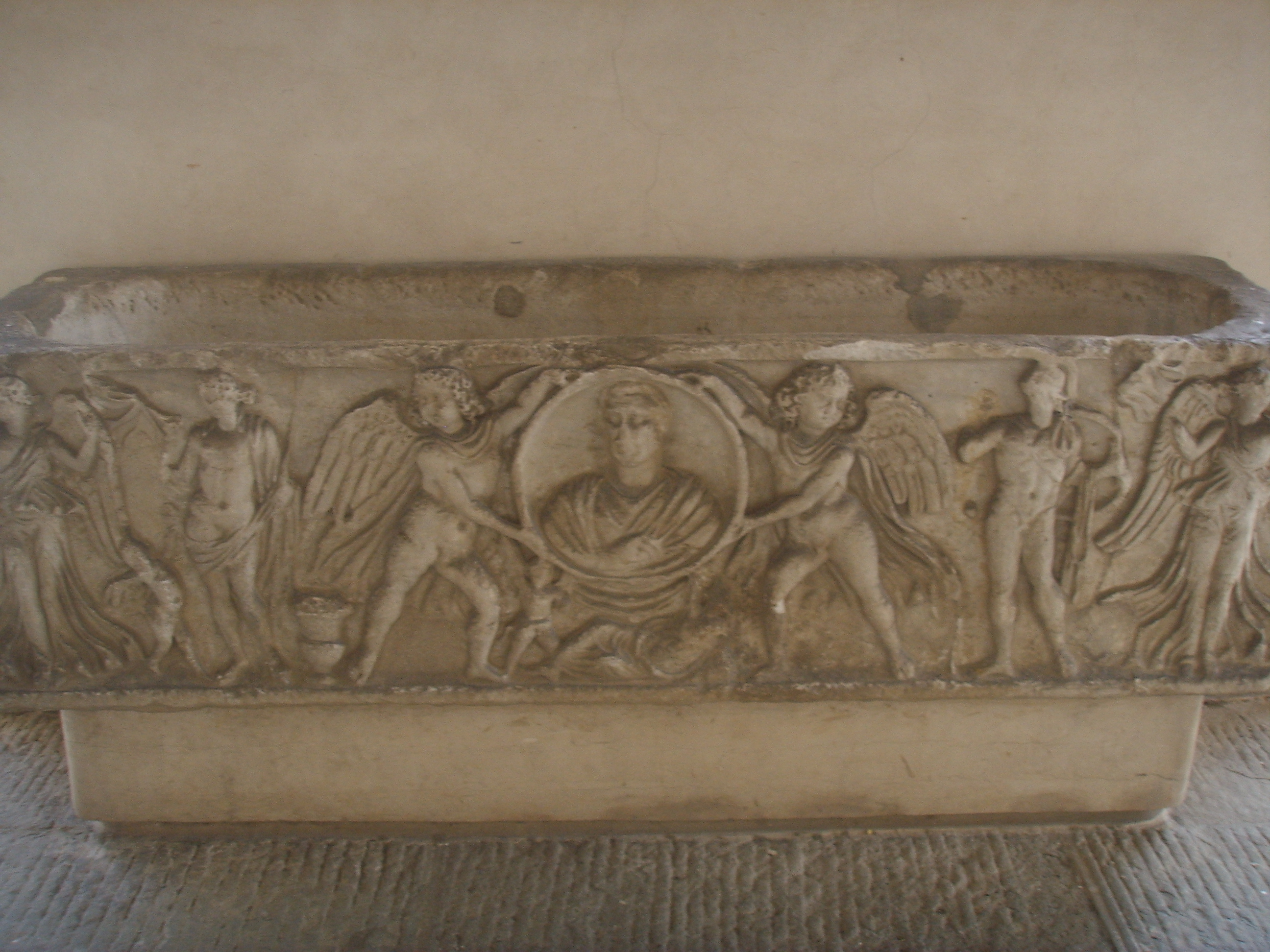 Poggio a Caiano Villa Roman age tomb in Poggio a Caiano, Italy